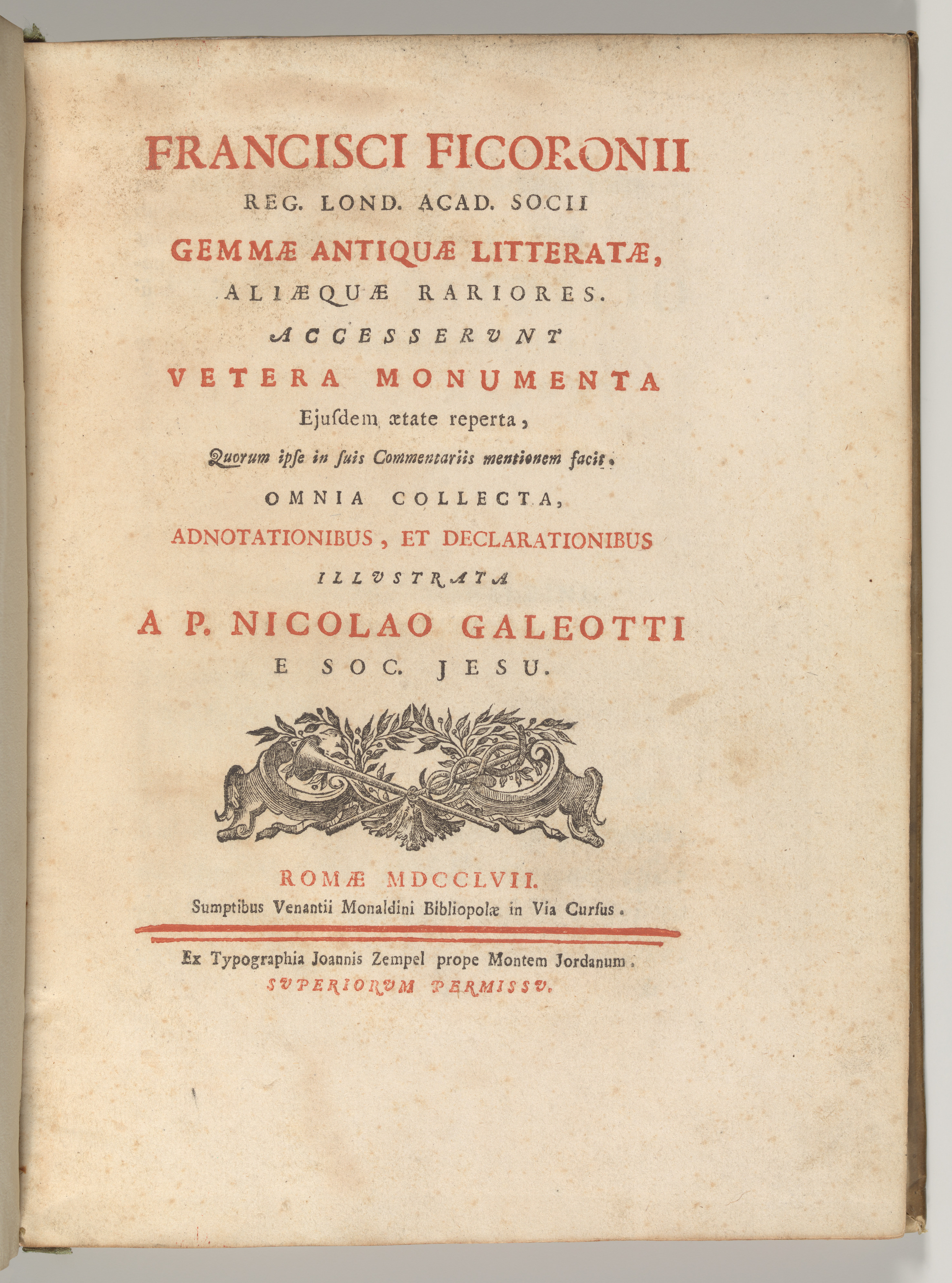 book; Books